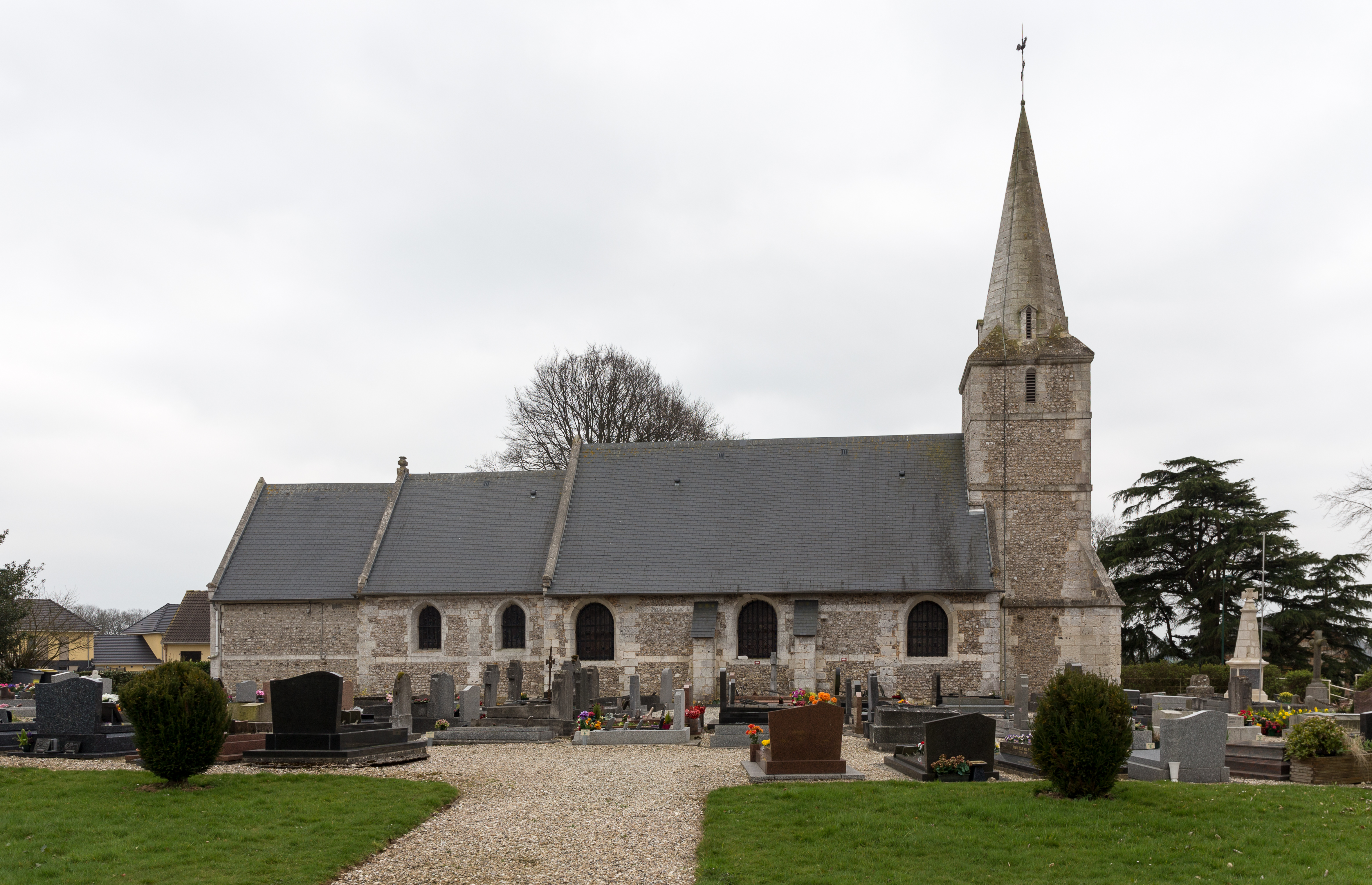 Église de Grand-Camp.